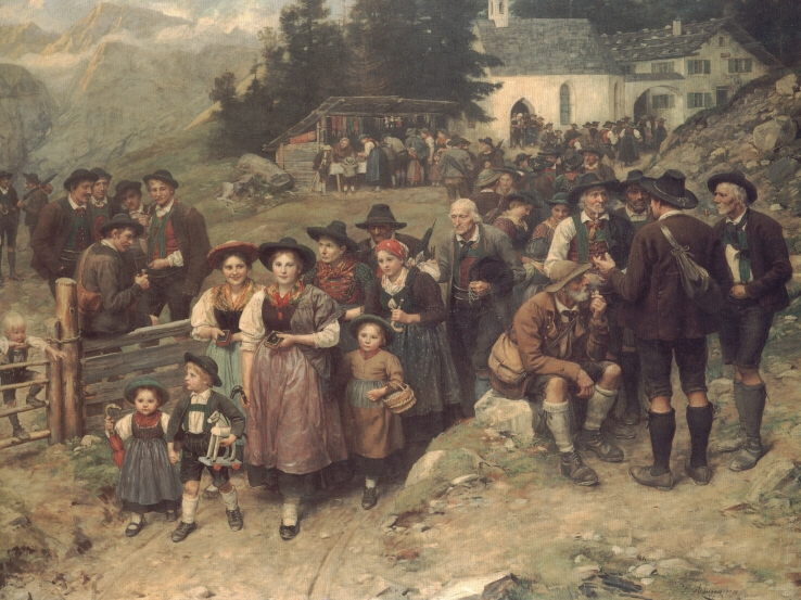 Pilgrimslabel QS:Len,"Pilgrims" label QS:Lfr,"Pélerins" label QS:Lde,"Wallfahrer"